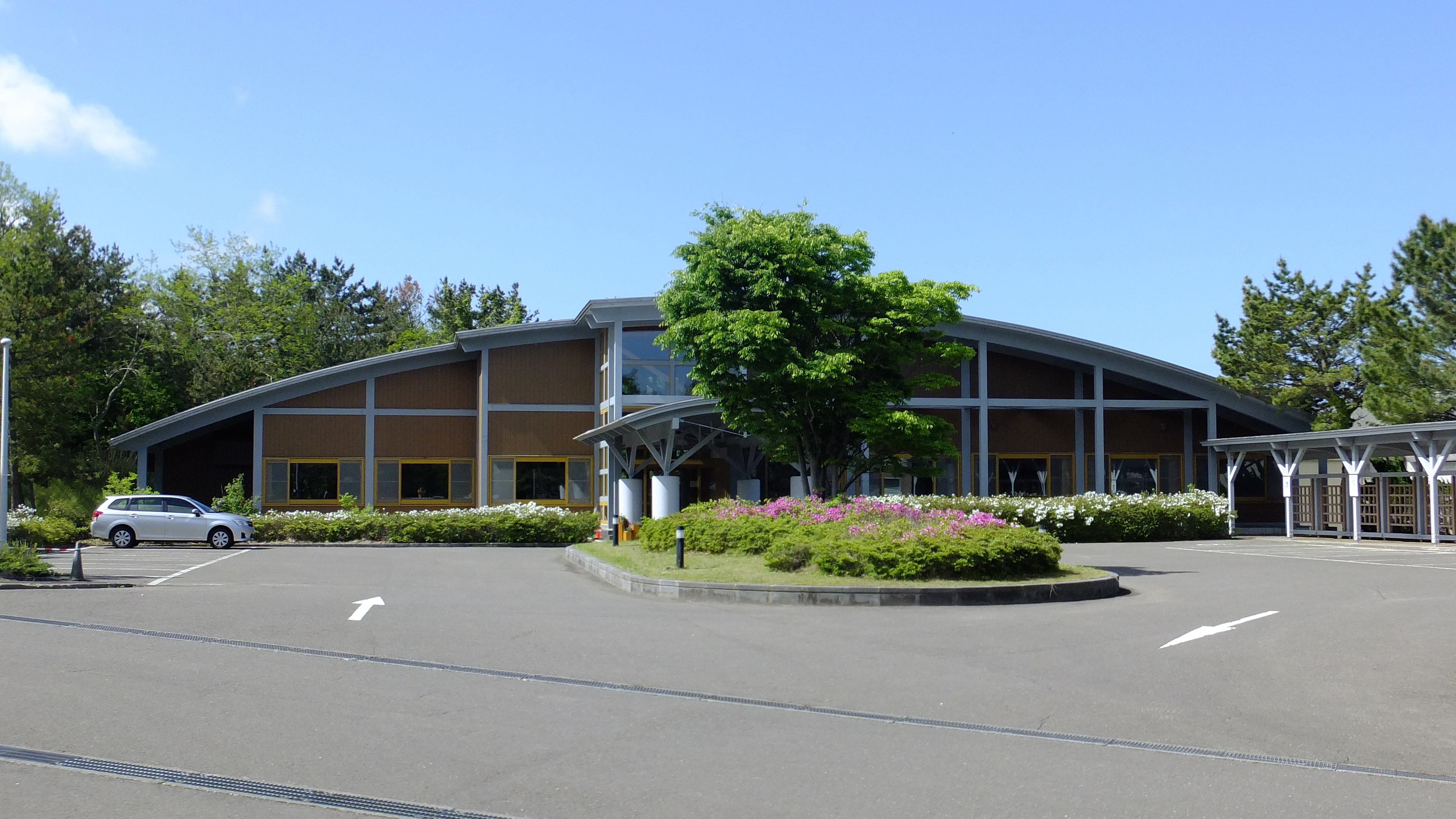 秋田県立大学木材高度加工研究所（秋田県能代市）